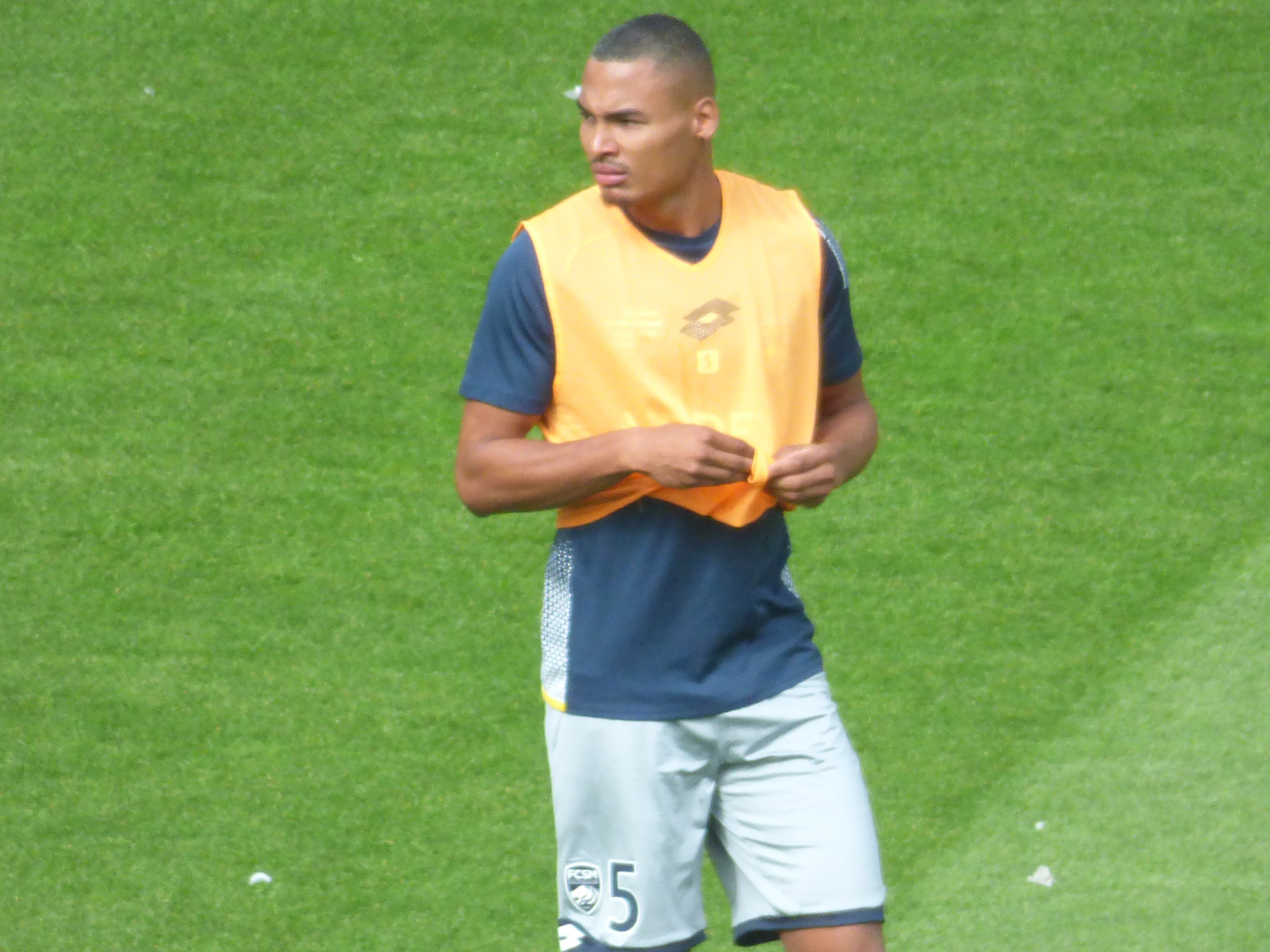 Olivier Verdon avant le match Lens / Sochaux, comptant pour la septième journée du championnat de France de football de Ligue 2, le 15 septembre 2018.